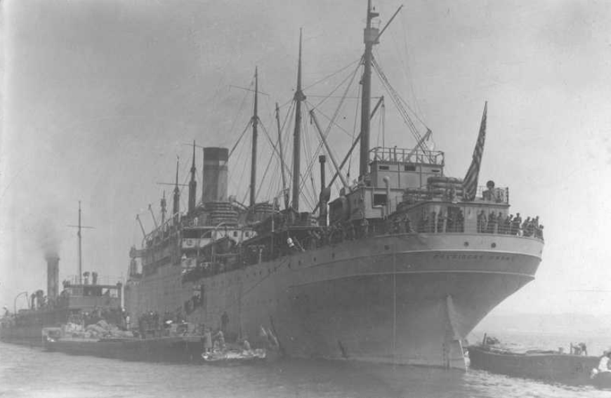 Americká loď S.S. President Grant - jedna z transportních lodí, jimiž byli přepravování českoslovenští legionáři z přístavu ve Vladivostoku zpět do vlasti- Speciálně tato loď realizovala v roce 1920 v pořadí 23. transport příslušníků československých legií z Vladivostoku (odplutí 22. nebo 27. dubna 1920) do Trestu (připlutí 12. června 1920) při němž bylo přepraveno cca 4613 až 5000 důstojníků a vojáků. V roce 1920 pak realizovala tato loď v pořadí 35. transport příslušníků československých legií z Vladivostoku (odplutí 24. srpna 1920) do Terstu (připlutí 13. října 1920) při kterém bylo přepraveno 1944 osob (důstojníků a vojáků).